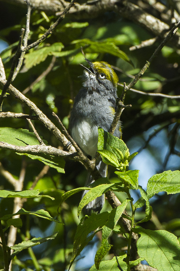 Slaty Vireo - Oaxaca - Mexico_S4E9941